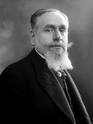 Guido Biagi